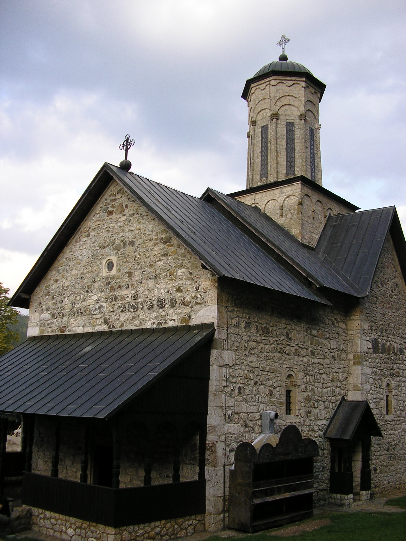 Манастир Липље код Теслића, RS.BA